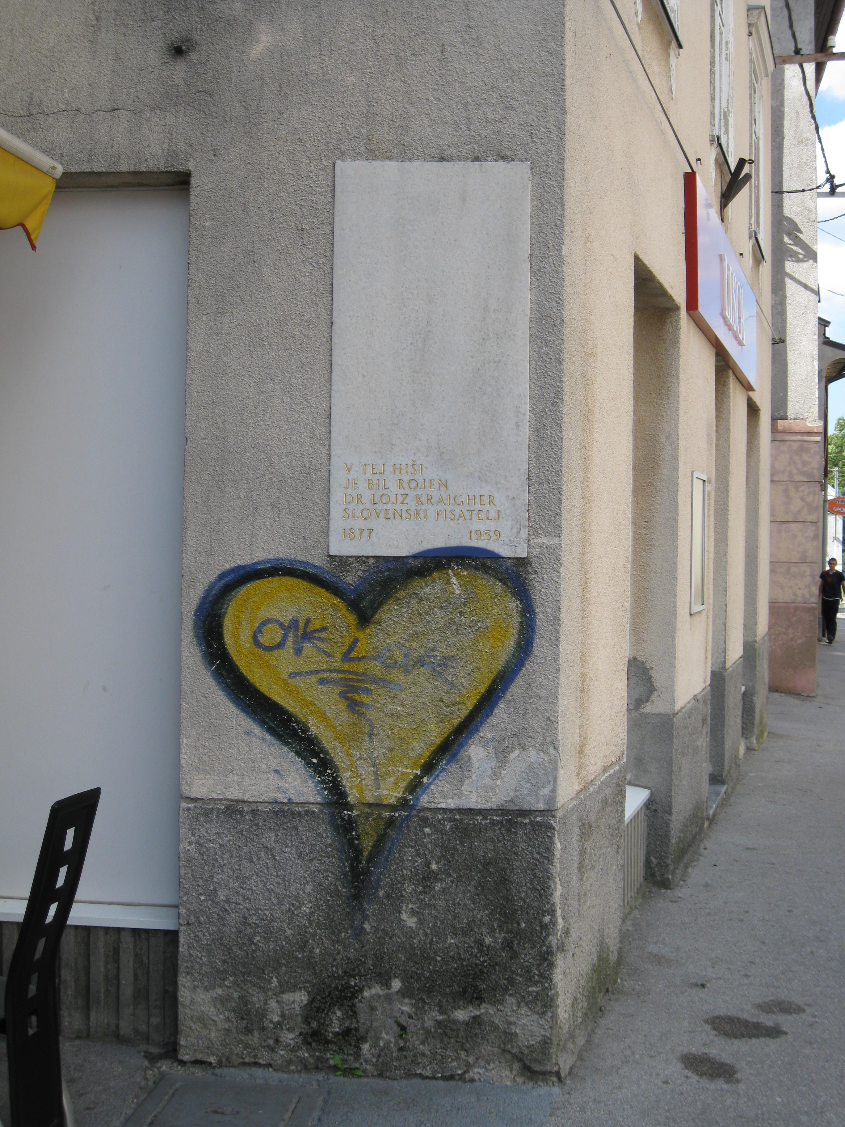 Gedenktafel für den slowenischen Schriftsteller und Arzt Alojz Kraigher, 1877-1959, geboren in Postojna